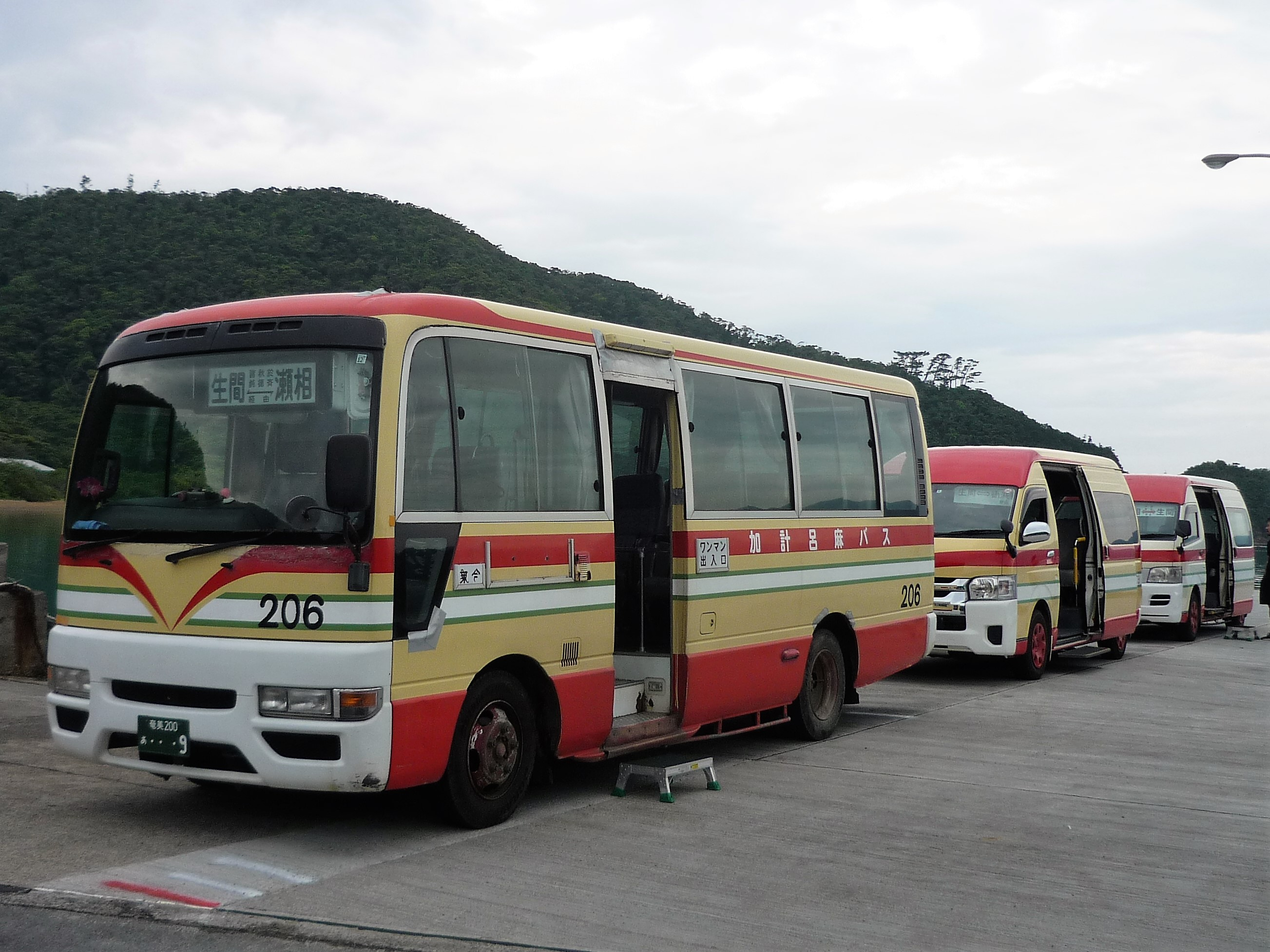 古仁屋からのフェリーに接続するため生間港に待機する加計呂麻バス